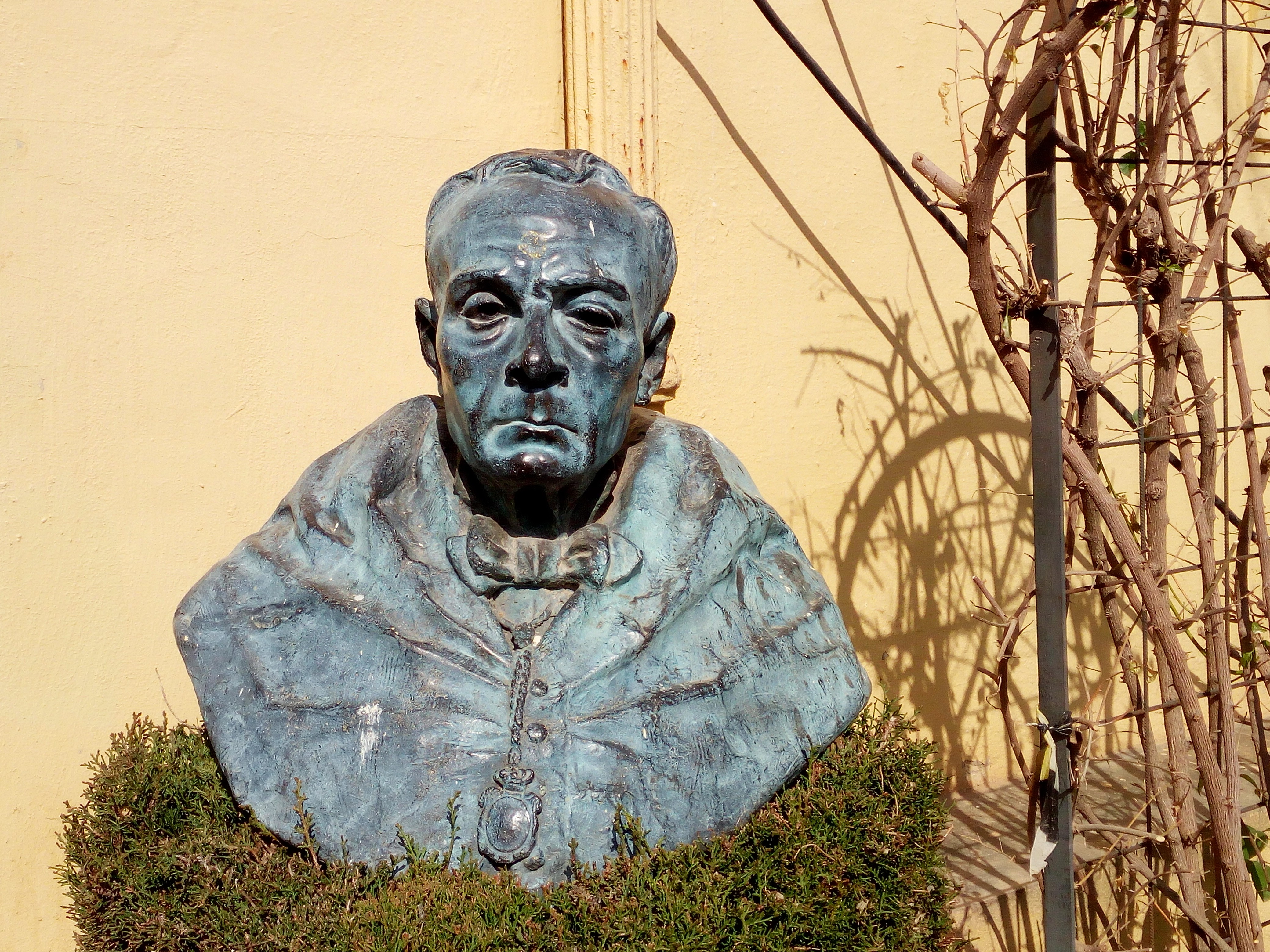 Esta escultura fue fundida en bronce a partir del molde original de José Navas Parejo, datada en 1906. En el Jardín Botánico de la Universidad de Granada.